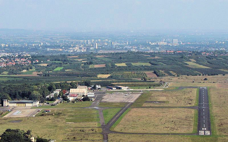 Flugplatz Mainz-Finthen Luftbild Verkehrslandeplatz EDFZ Foto 2008 Wolfgang Pehlemann Wiesbaden IMG_0296